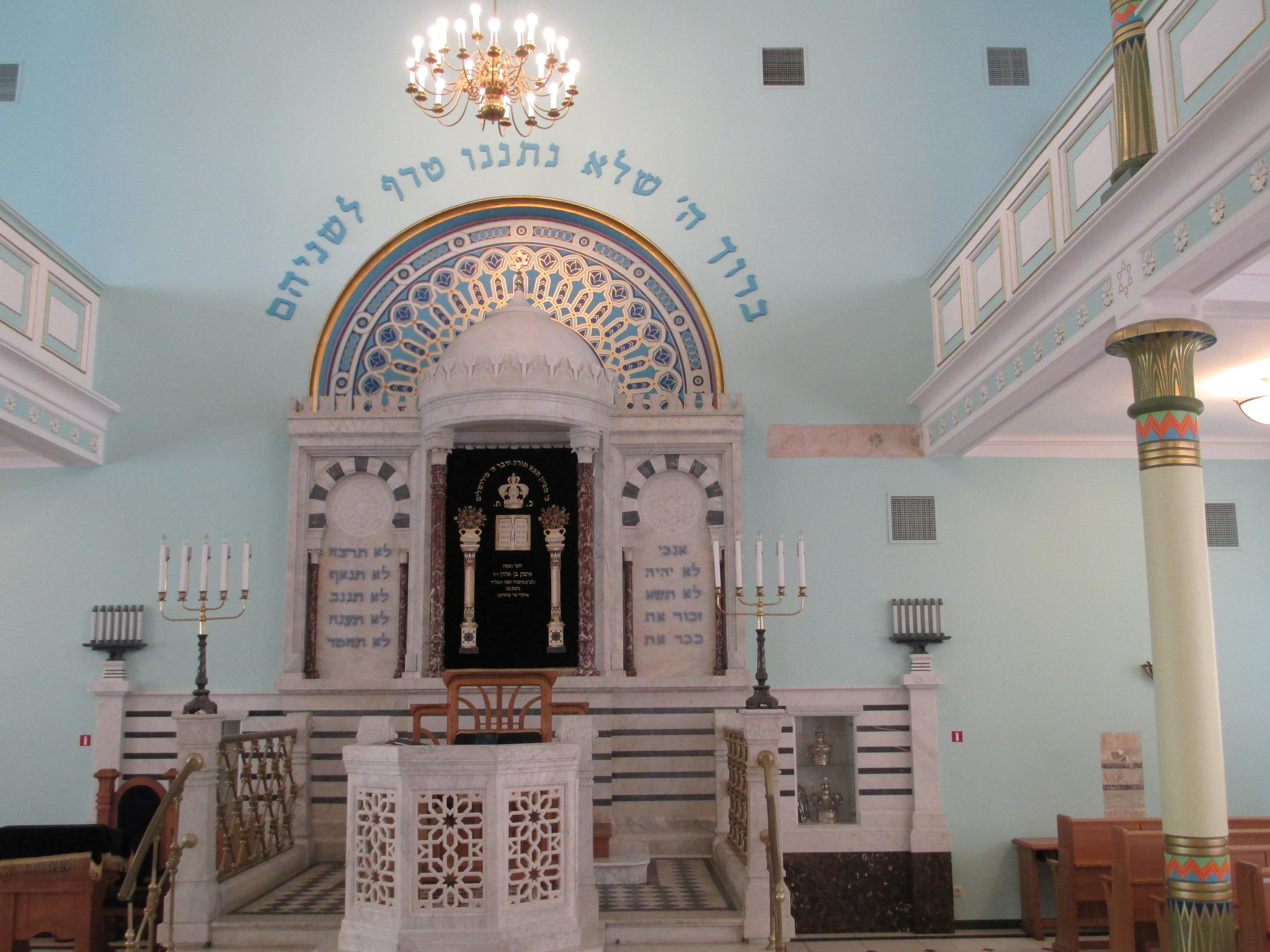 בית הכנסת פייטב בריגה